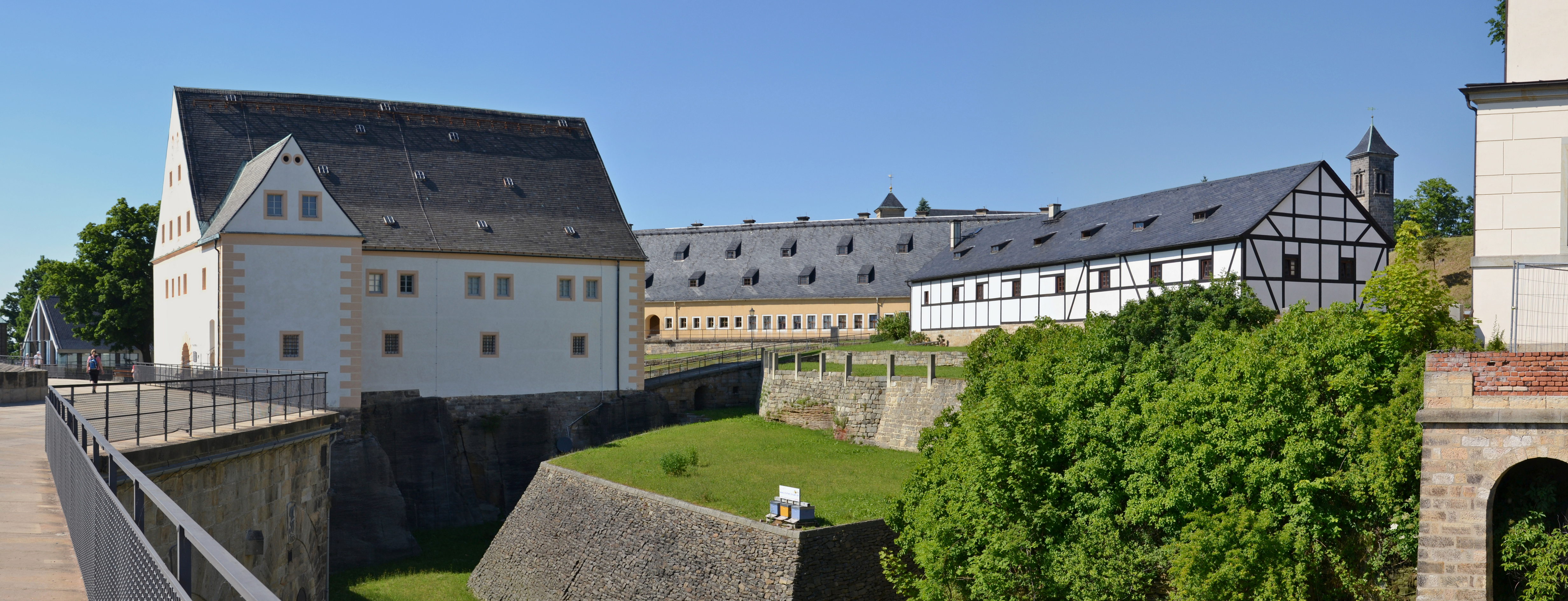 Festung Königstein, Sachsen